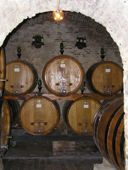 Beschreibung: Weinfässer mit dem Vino Nobile in einer Kellerei in Montepulciano Fotograf: Benutzer:burgkirsch 2004 Quellenangabe und Beleg an burgkirsch(at)web.de erbeten.